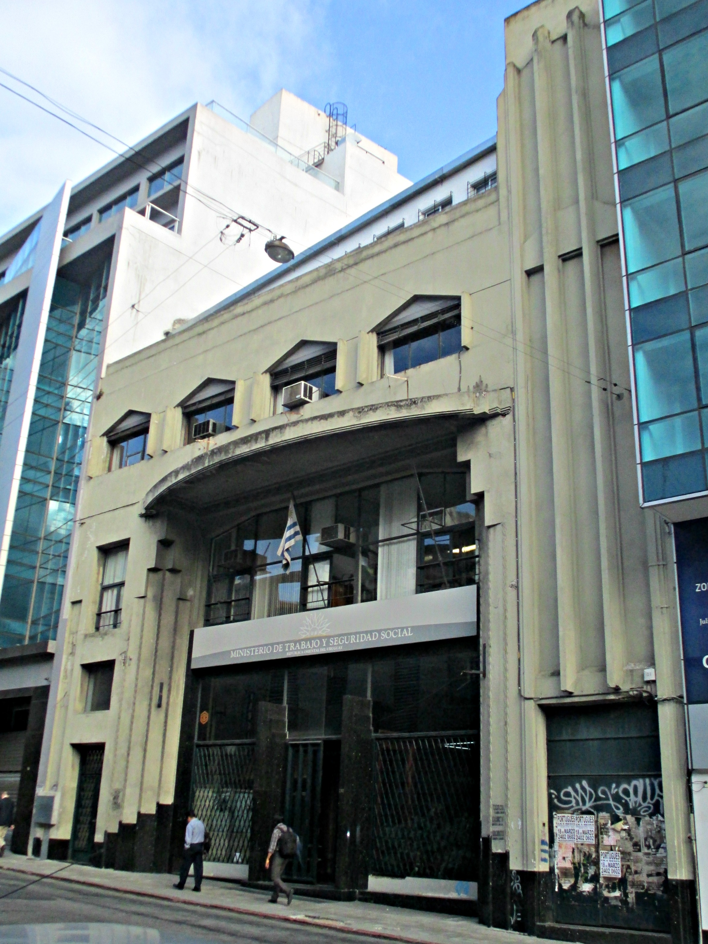 Casa Barth en Montevideo, Uruguay. Diseño del arq. Carlos A. Surraco.